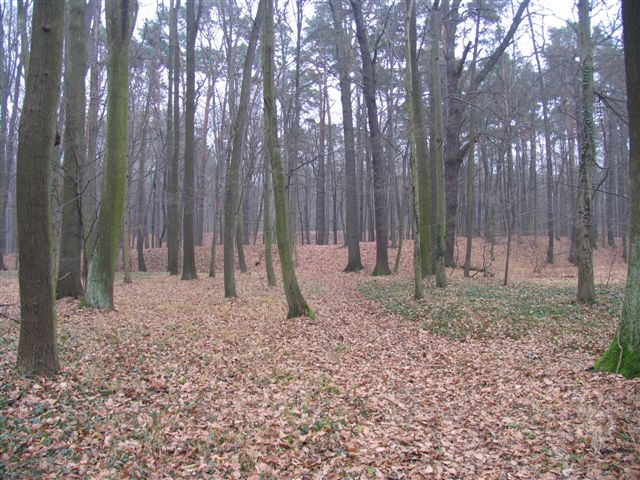 Gród Chrobry w Szprotawie, widok obiektu od strony zachodniej.